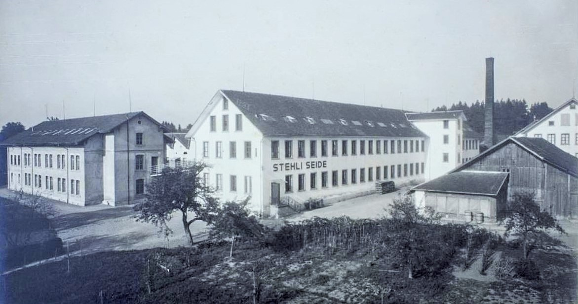 Stehli Seiden AG, Obfelden ZH, Schweiz